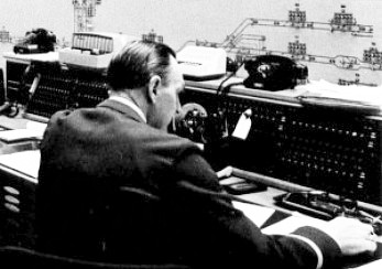 Tunnelcentralen i huset Icarus, Munkbrogatan